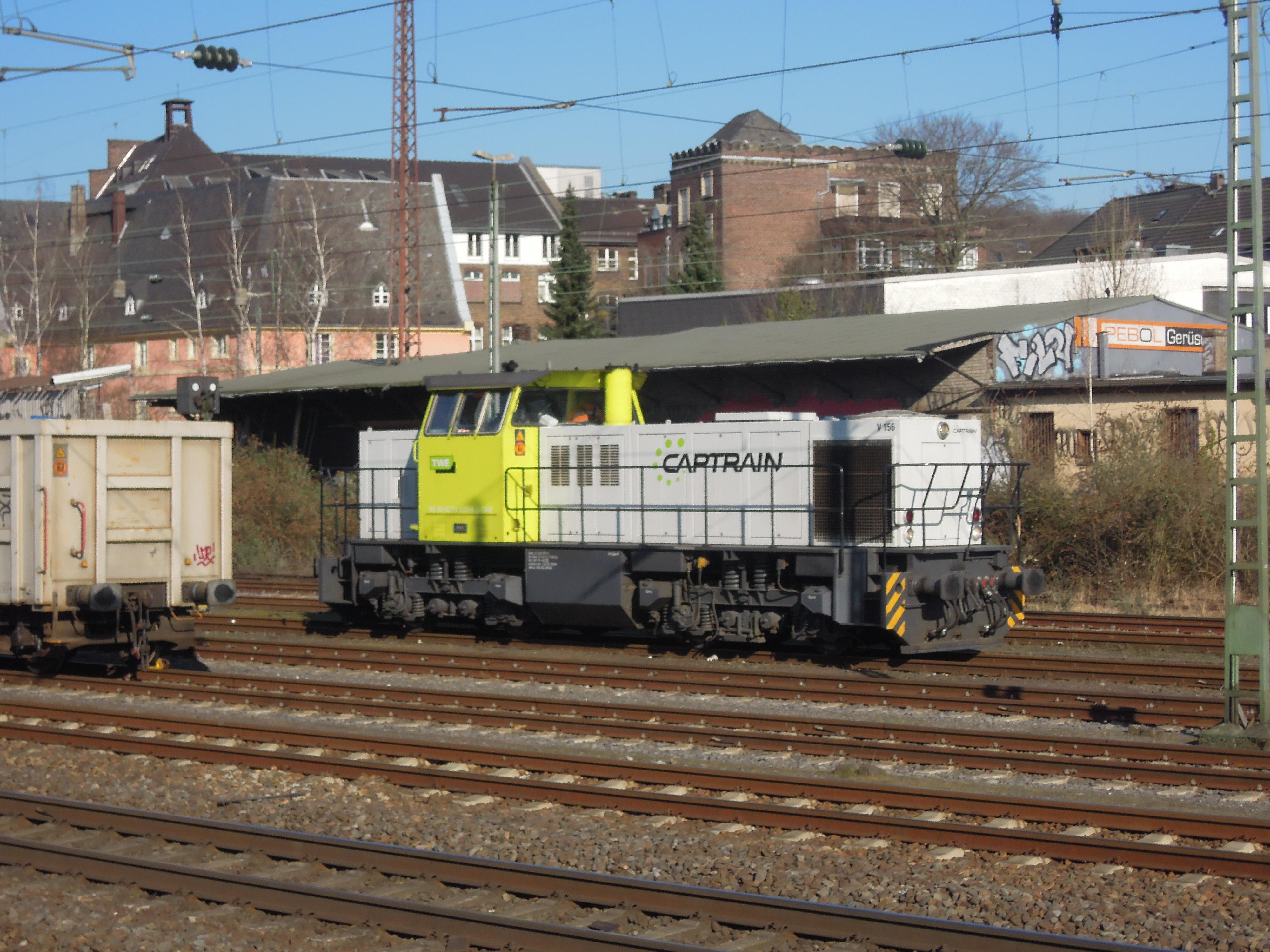 V156 in Captrain-Lackierung rangiert in Düsseldorf-Rath.